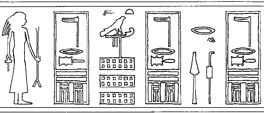 seal impression with the horus-name of pharao Zoser (3rd dynasty)